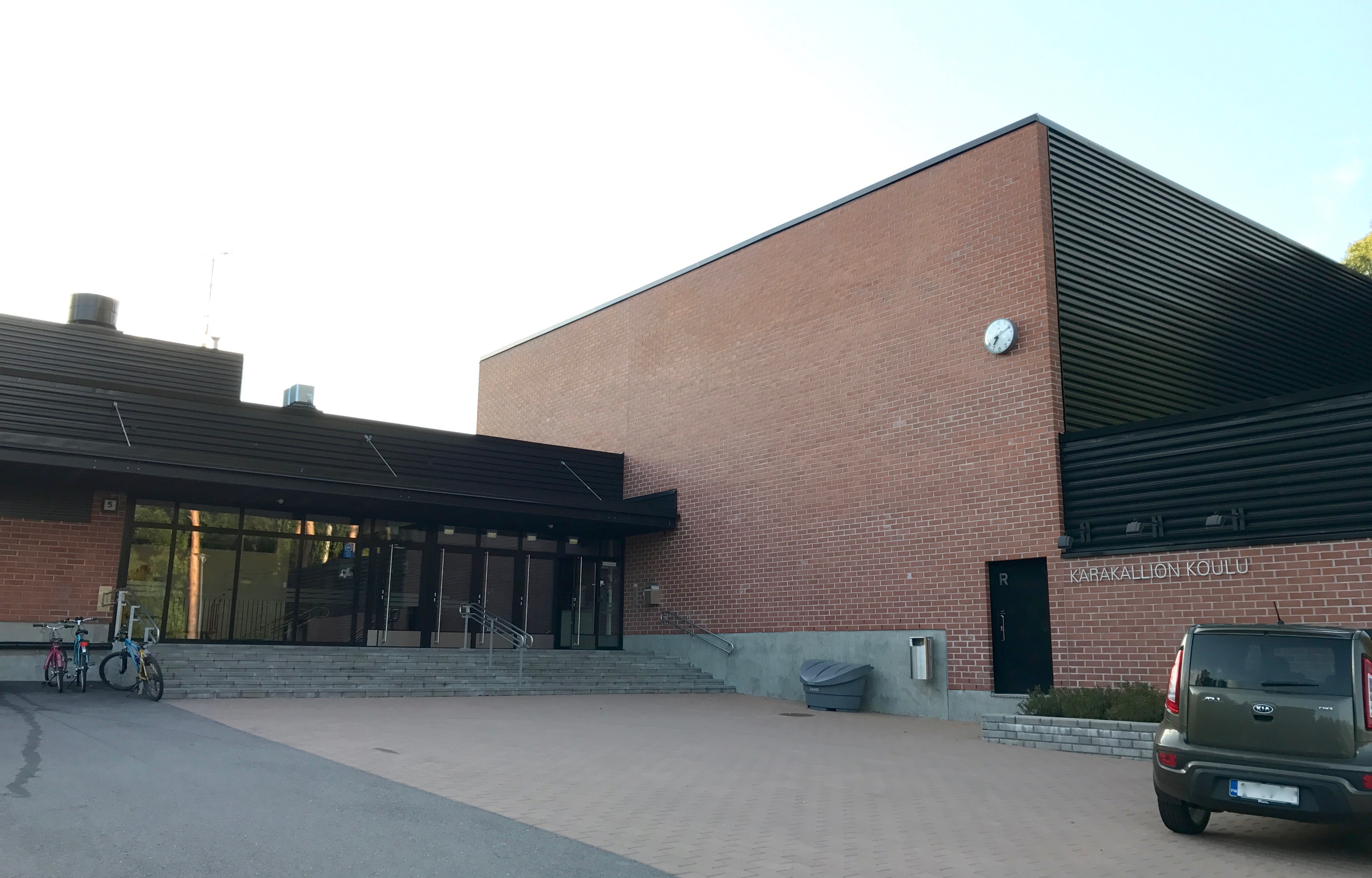 Karakallion koulu Espoossa